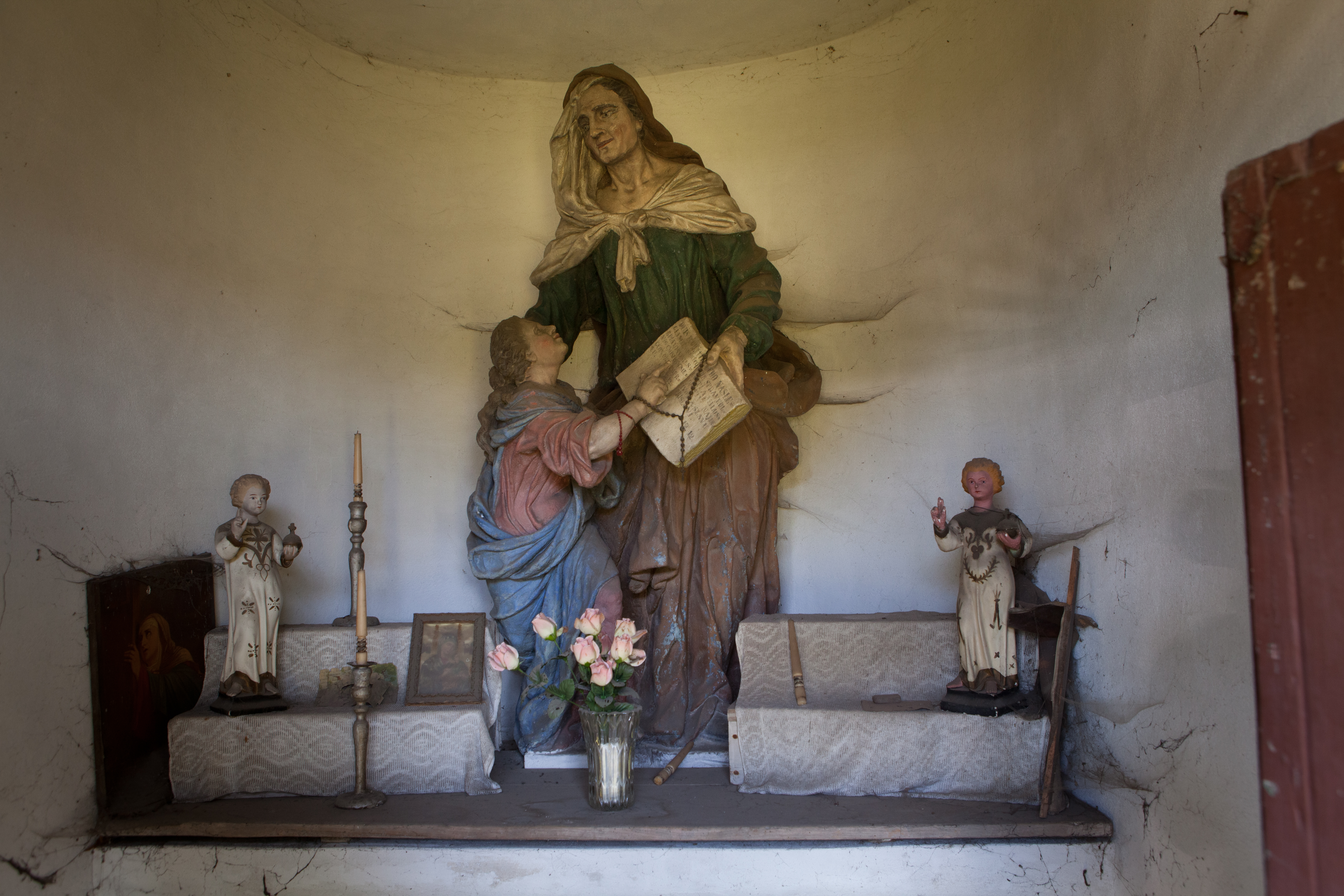 Kaple sv. Anny (Řevničov), Tyršovo nám., Řevničov